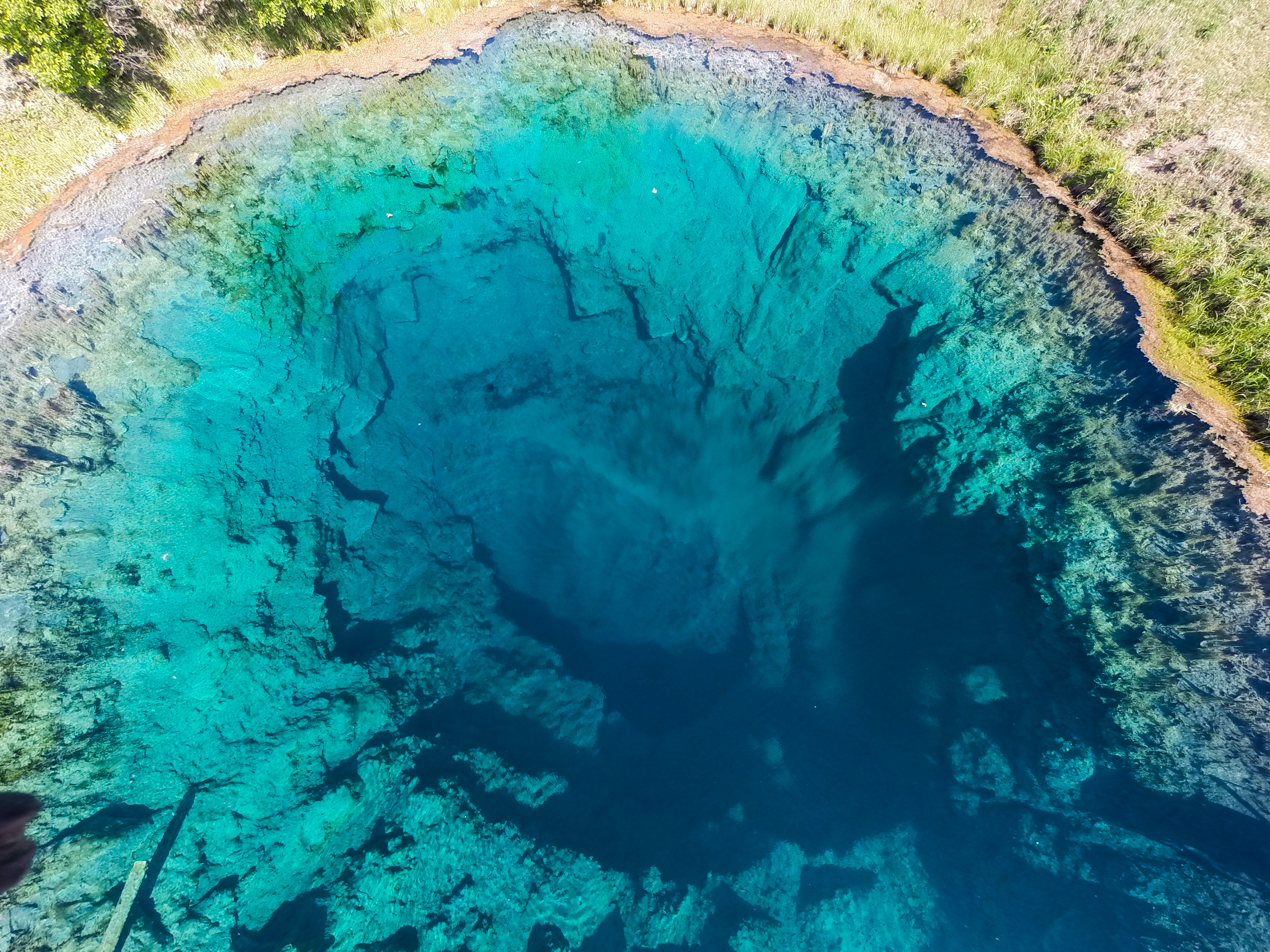 Голубое озеро, Сергиевский район This image is related to the protected area of Russia number 6310190